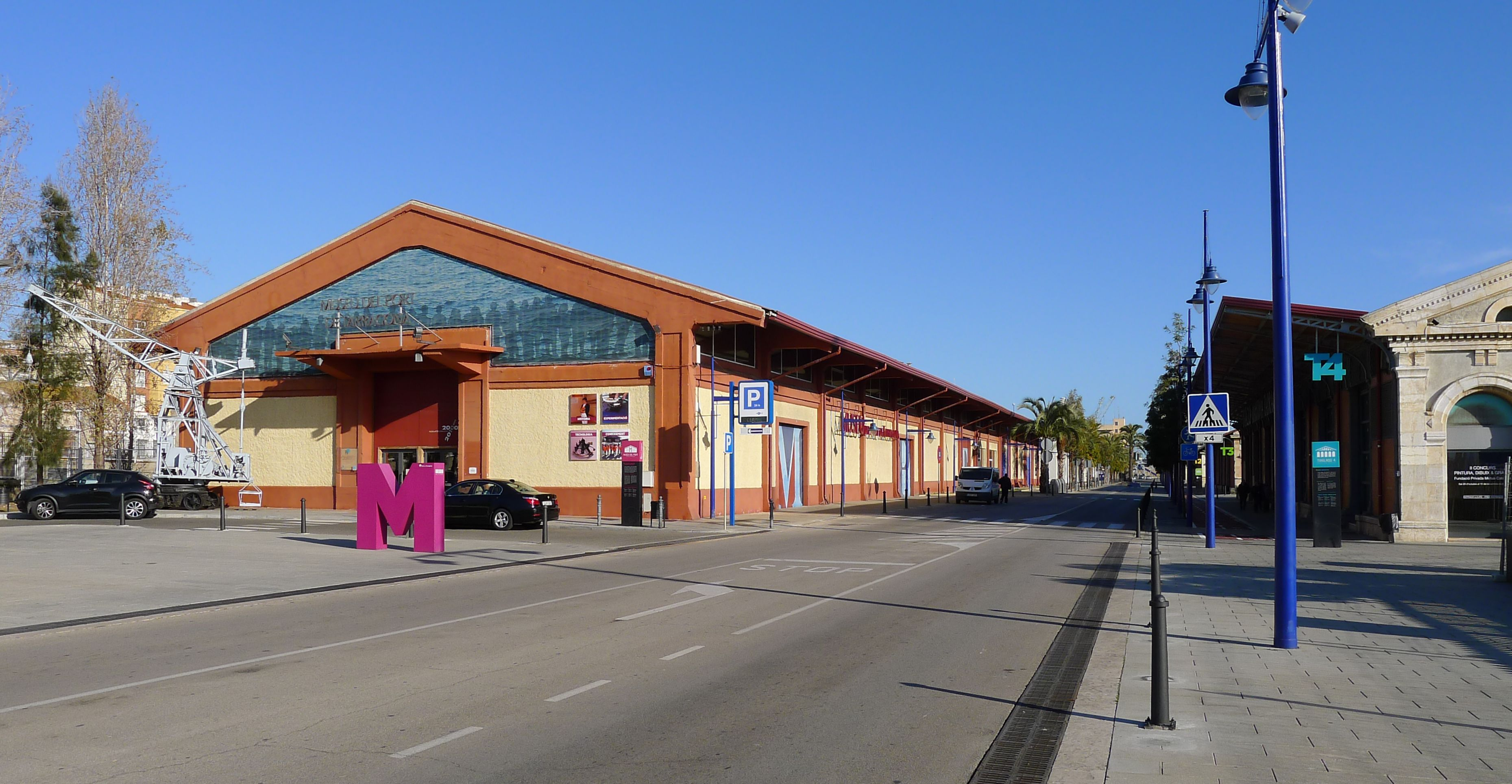 Hafenmuseum (Museu del Port de Tarragona), in einem ehemaligen Lagerhaus (refugi) aus den 30er Jahren des 20. Jahrhunderts, an der Moll de Costa; 2018